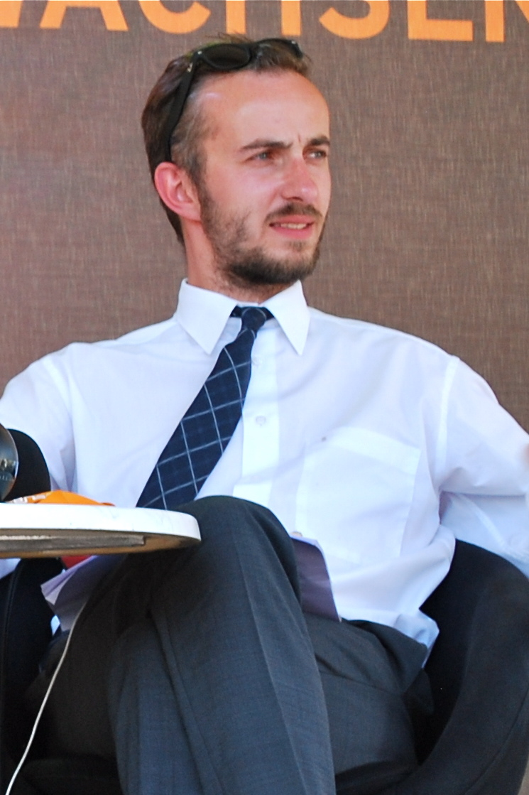 Jan Böhmermann: 15 Jahre RadioEins